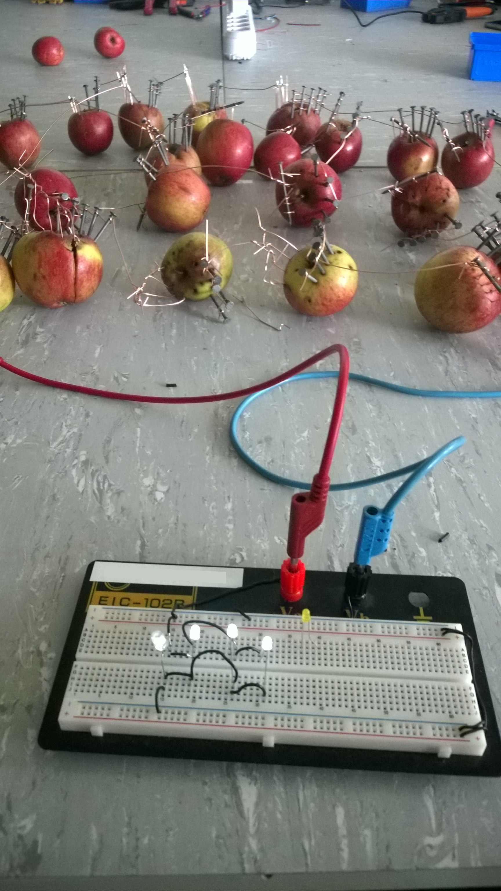 Schulversuch galvanische Zelle mit Äpfeln, Kupferdraht, Nägeln und 4 weißen LED